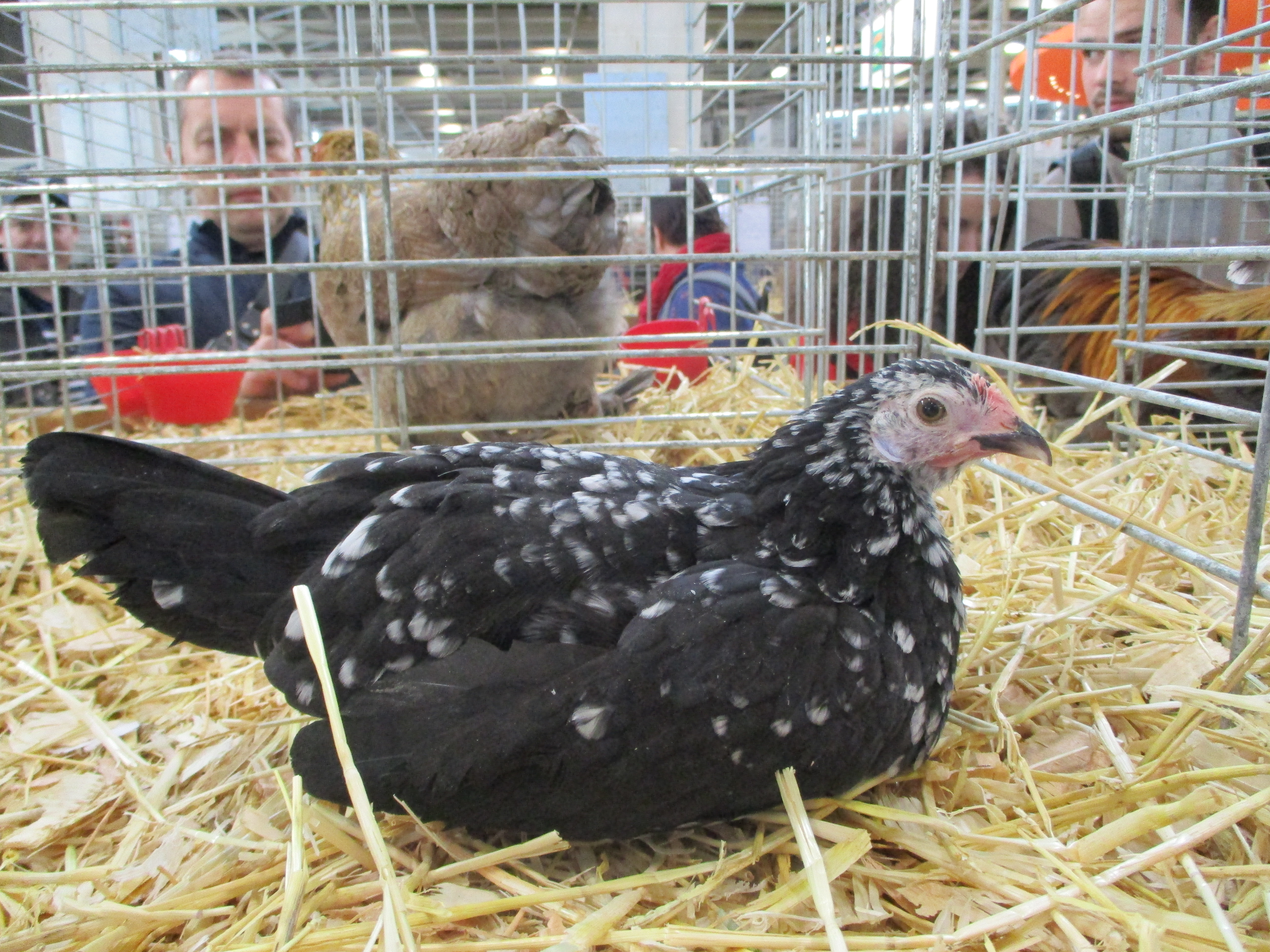 Poule de Gournay au salon de l'agriculture de Paris 2019. Plumage noir caillouté blanc.